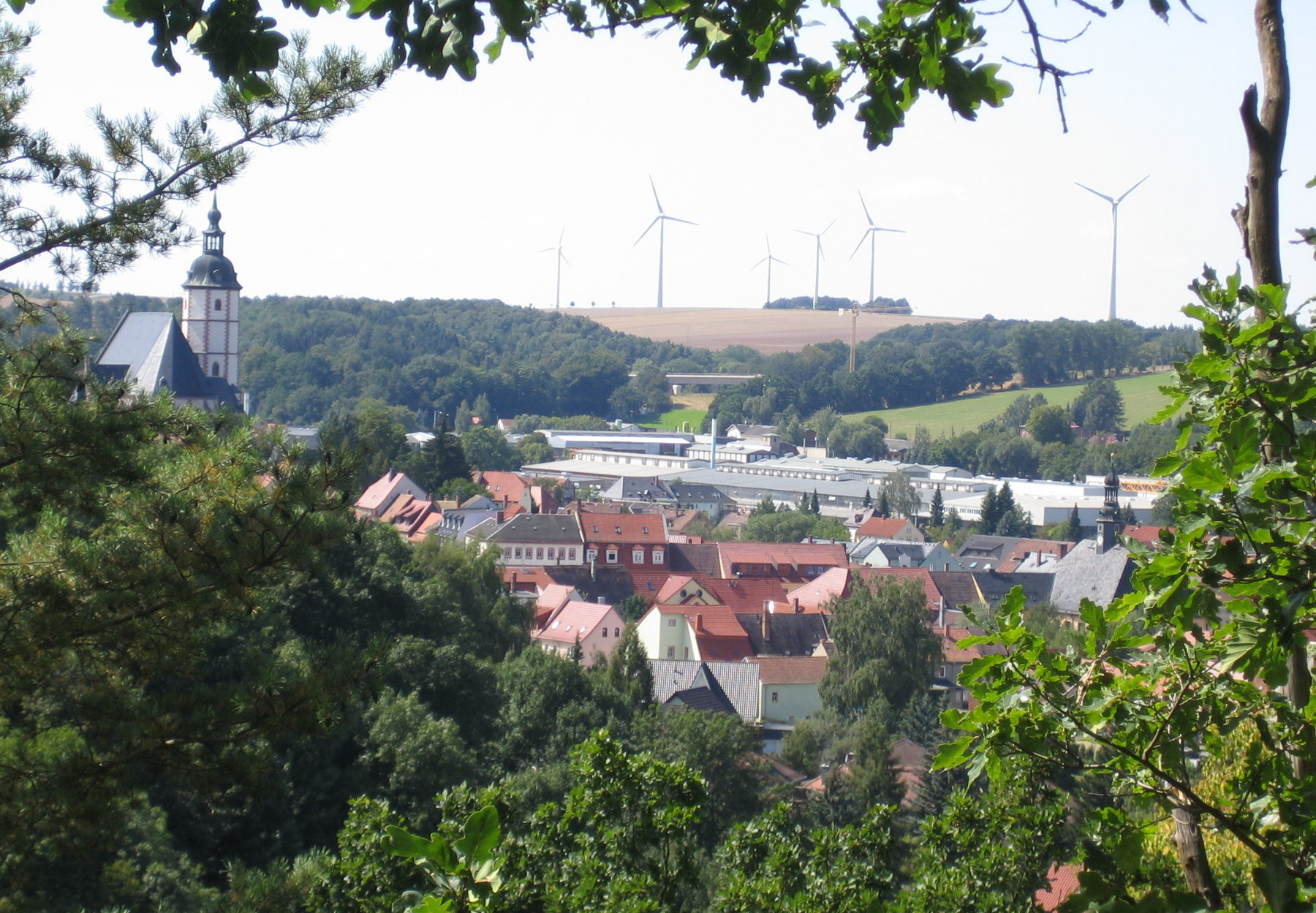 Blick über Penig (Sachsen) von der Weißen Spitze Richtung Westen, links im Bild die spätgotische Stadtkirche „Unser Lieben Frauen Auf Dem Berge“, im Hintergrund die im Bau befindliche Muldenbrücke der A72